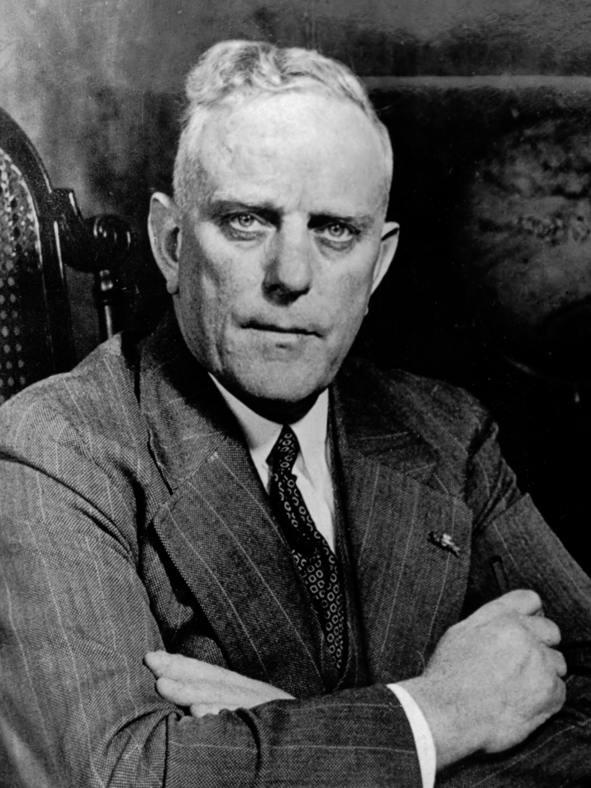 portretten, directies, luchtvaart, Plesman, Albert 31 december 1953